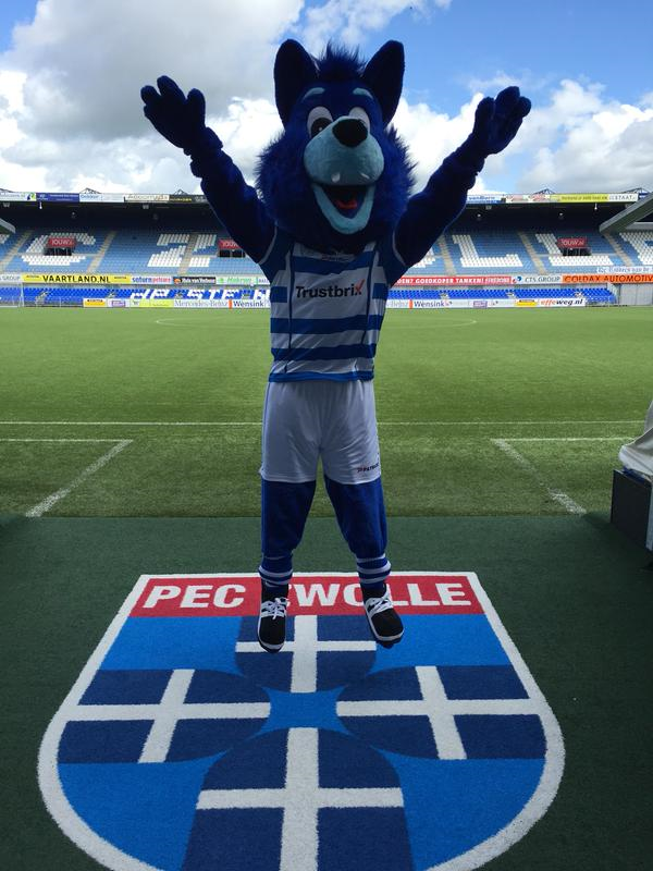 スタジアムにて撮影